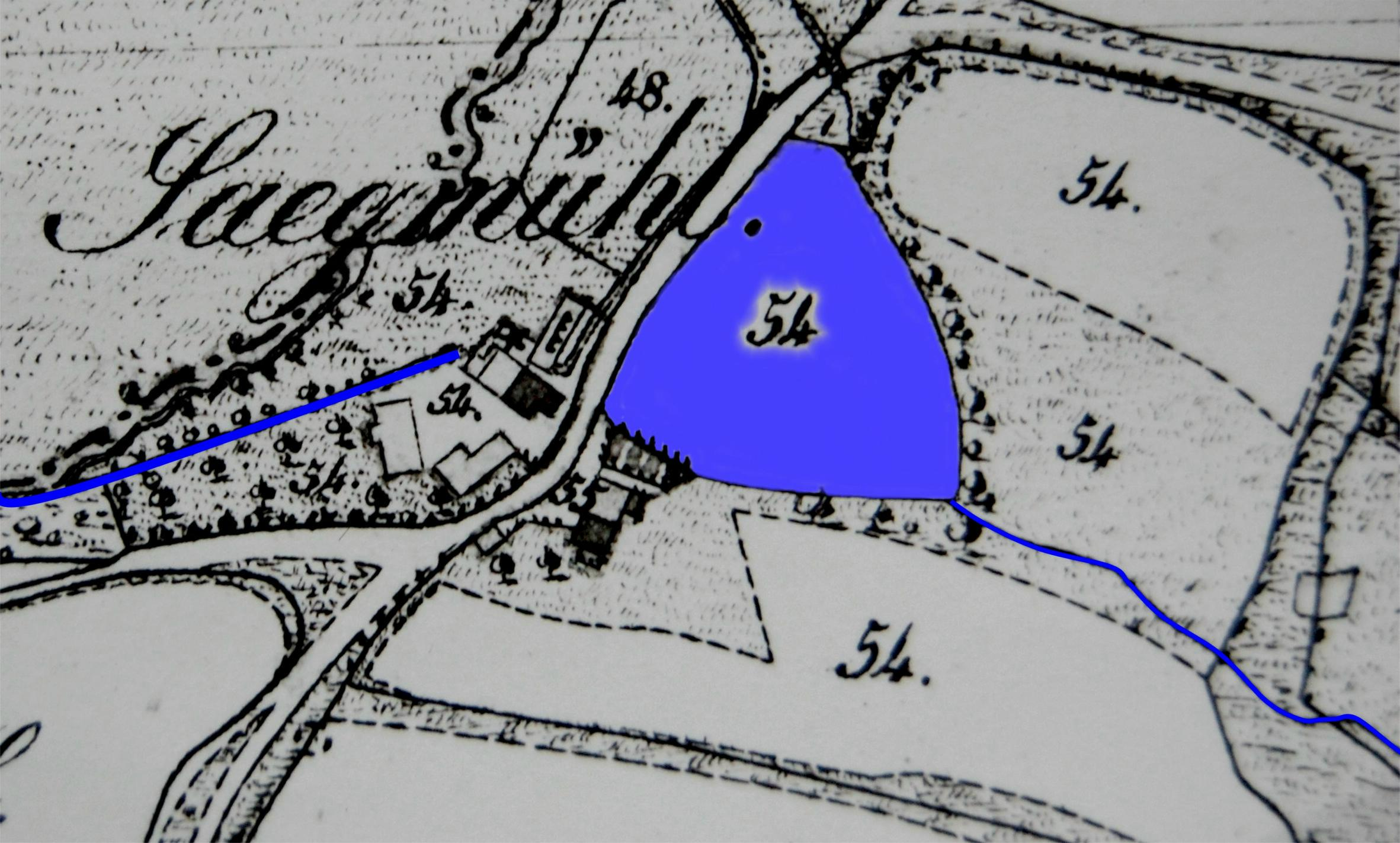 Karte von der Landvermessung im Jahre 1836 Der frühere Seemühlweiher wurde nachträglich von A. Köppl blau eingefärbt, um die Lage zu verdeutlichen.